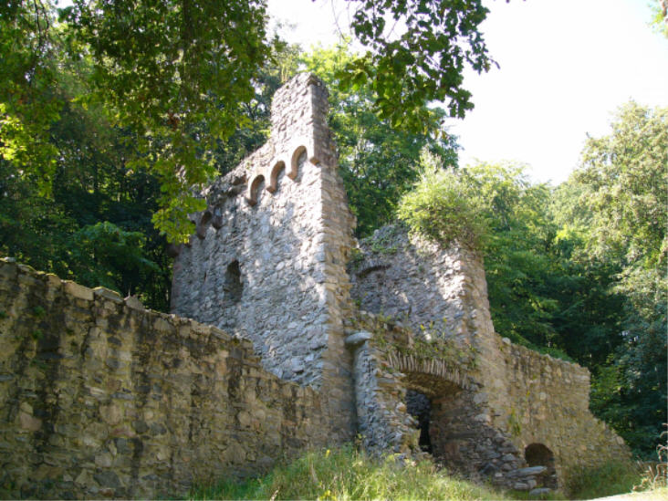 Burg Rodenstein, Teile der Ringmauer und in der Mitte den sog. Mühlturm